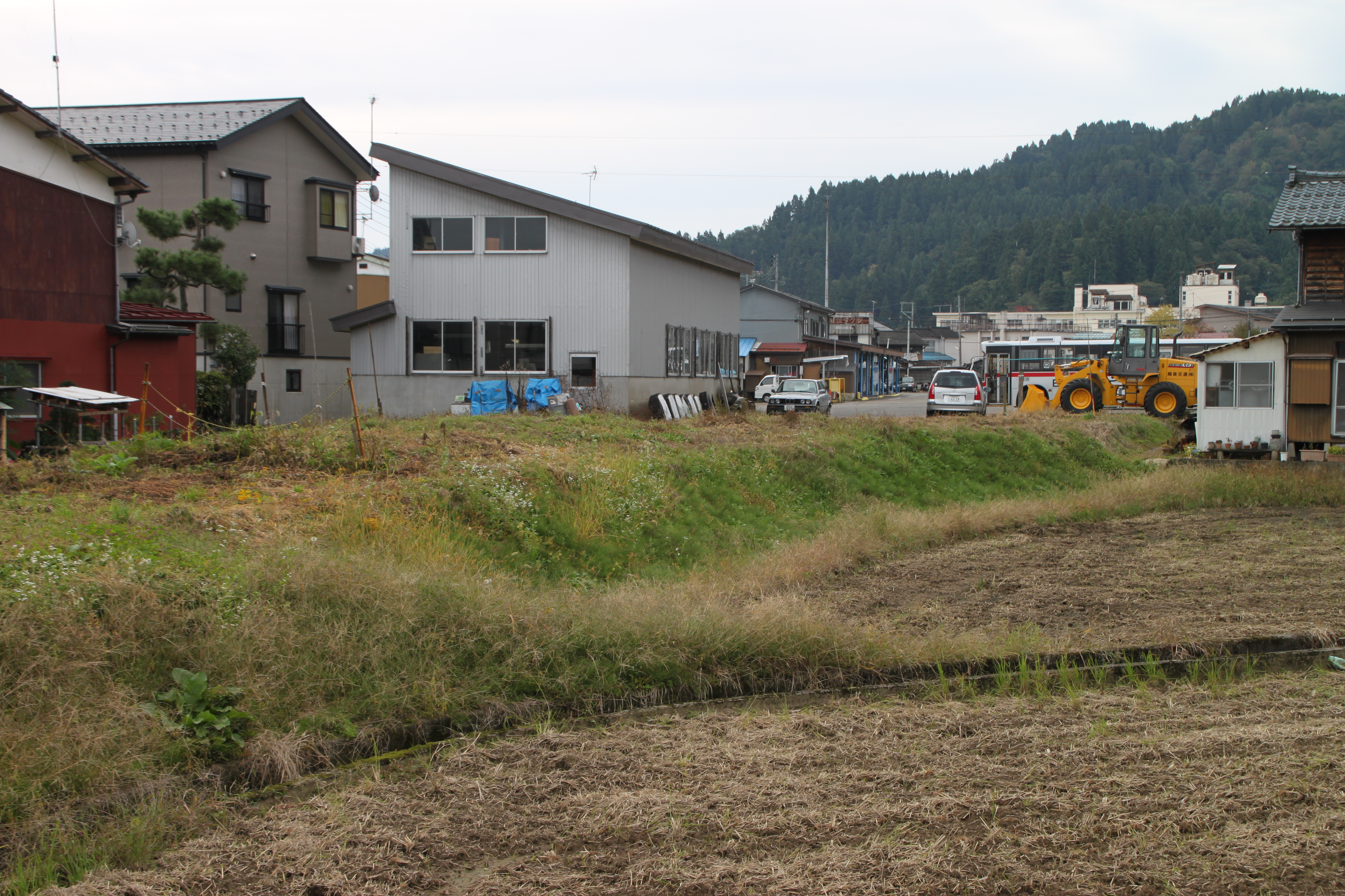 栃尾鉄道栃尾駅進入口。